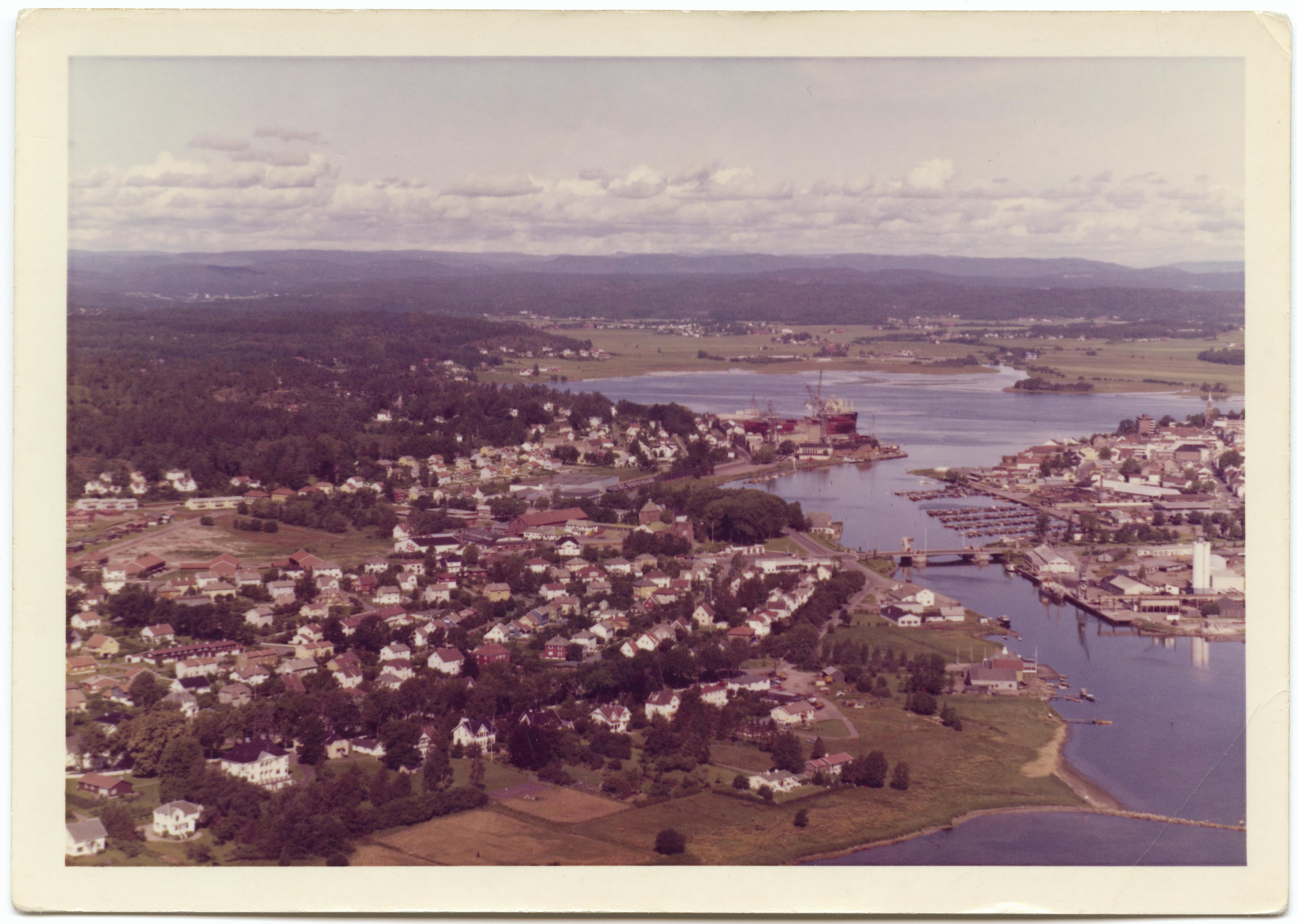 WF.S.185177